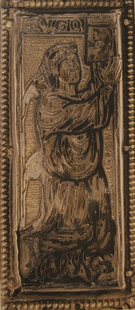 Zelfportret (?) van Hugo d'Oignies van de boekband van het evangeliarium in Namur